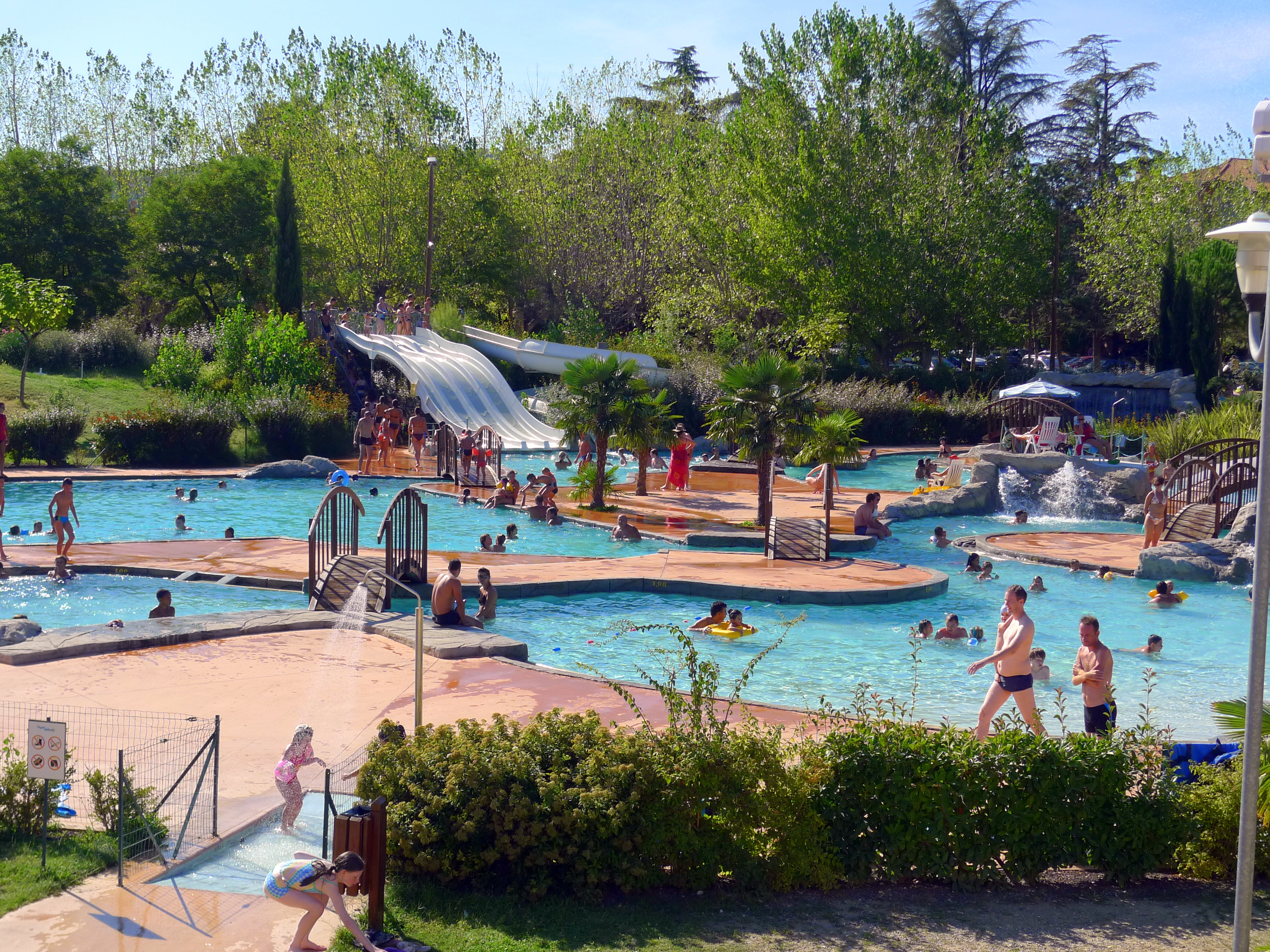 Tremplins du pôle aquatique Soleïado à Nyons